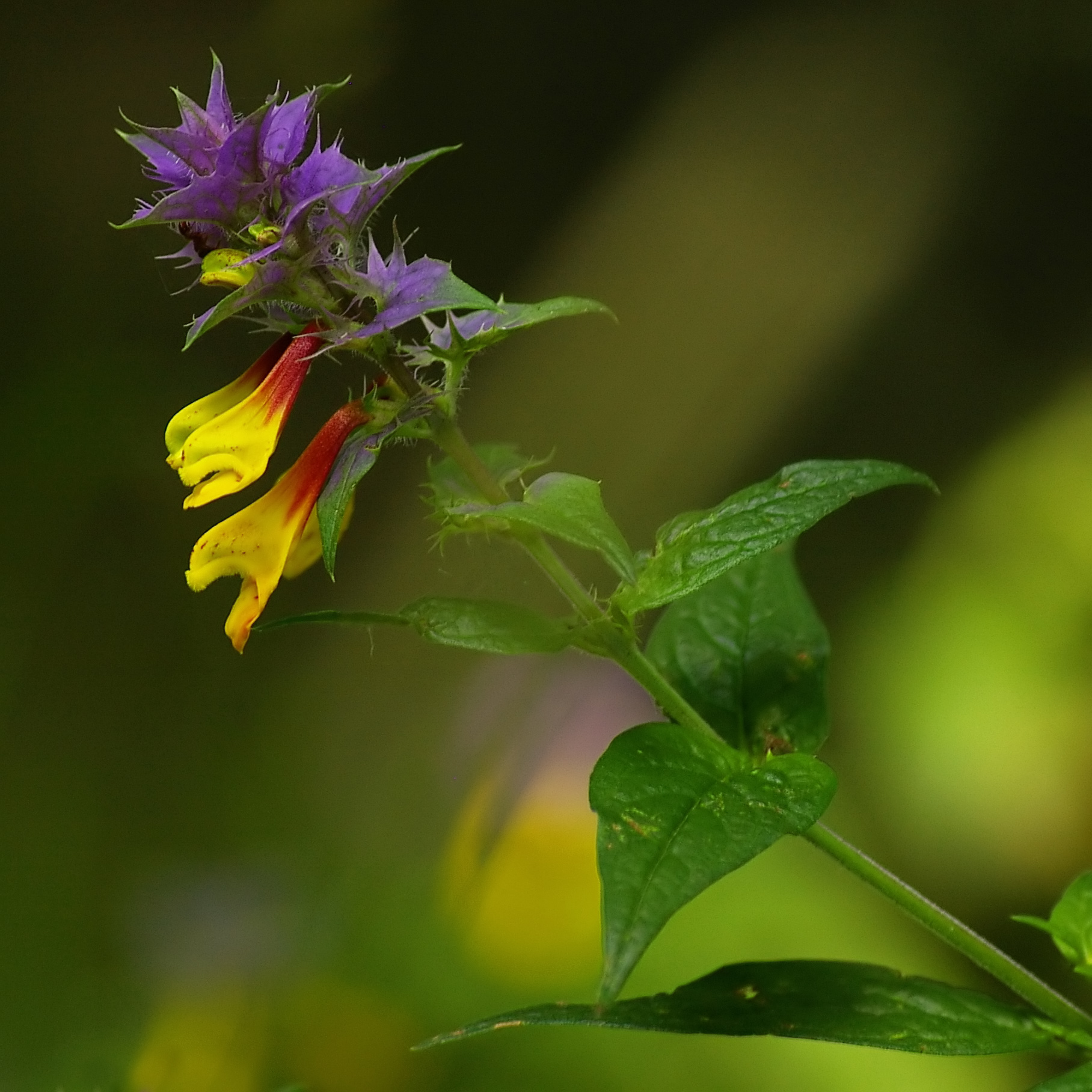 Melampyrum nemorosum. Pszeniec gajowy.